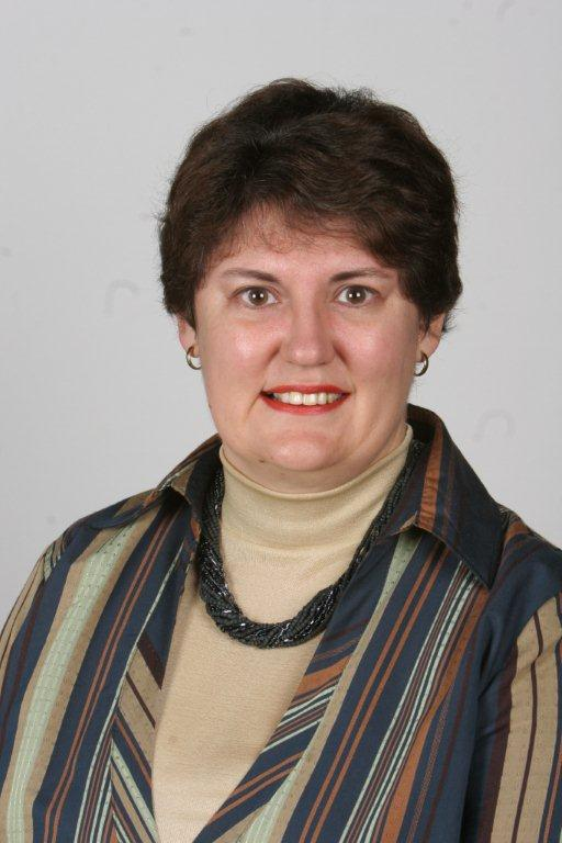 Alana Bailey